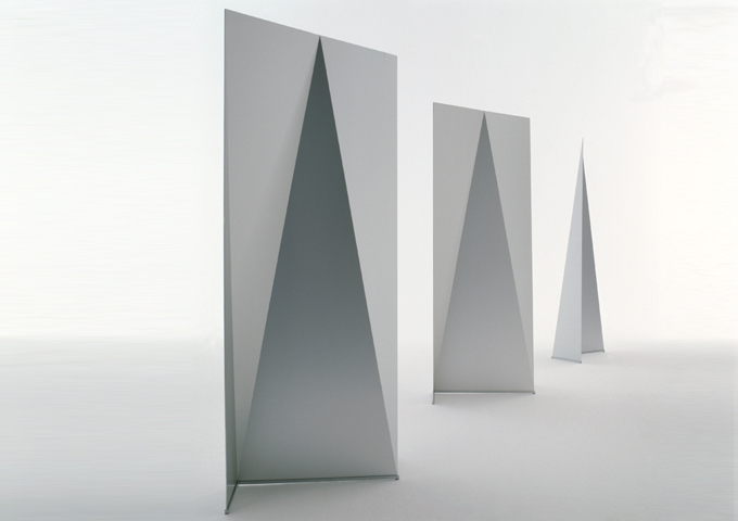 SHIKI 3